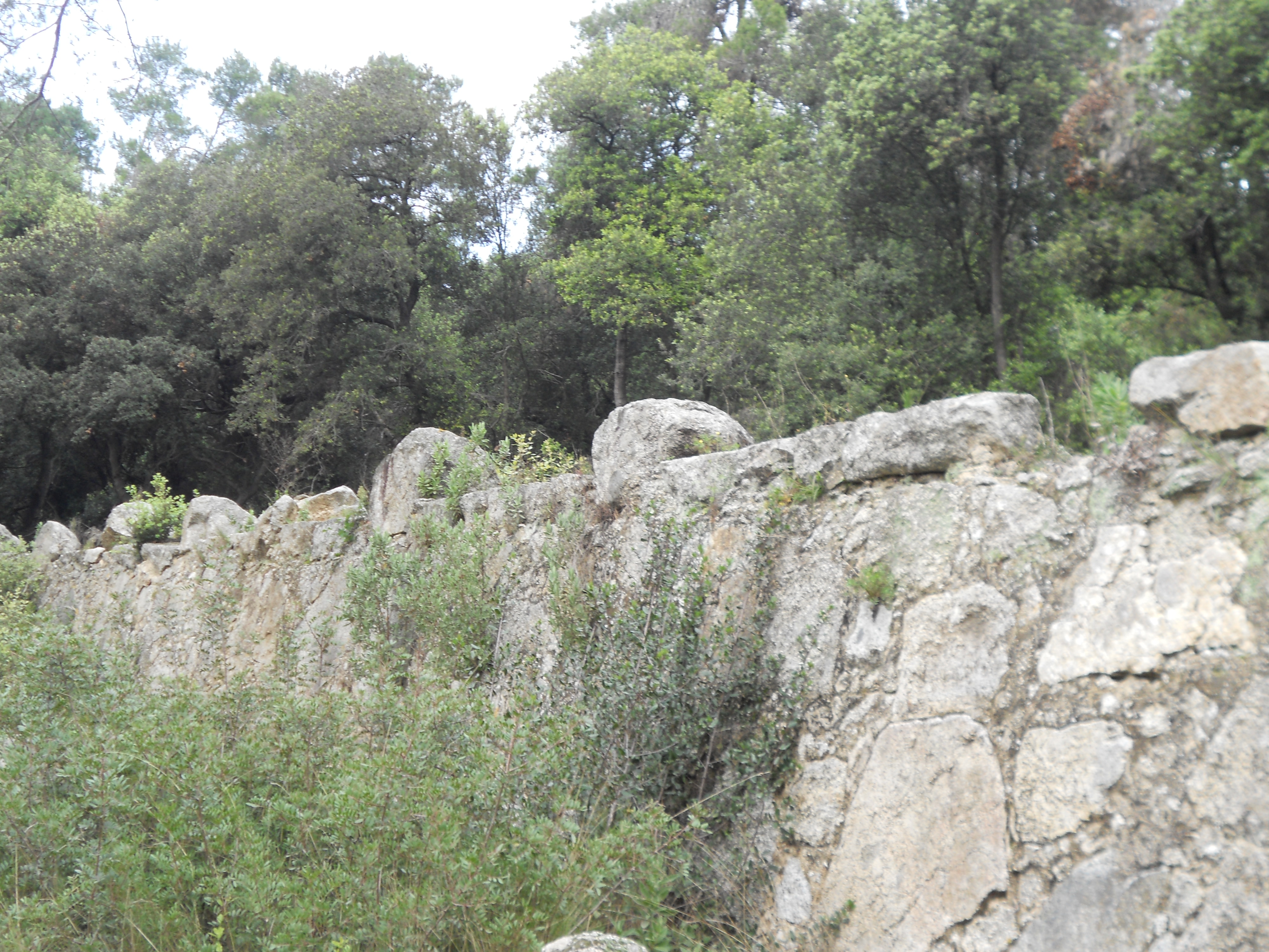 Guarda-rodes de l'antiga via romana de Parpers, coneguda com Via Sèrgia, que anava des d'Iluro (Mataró) fins Ausa (Vic).